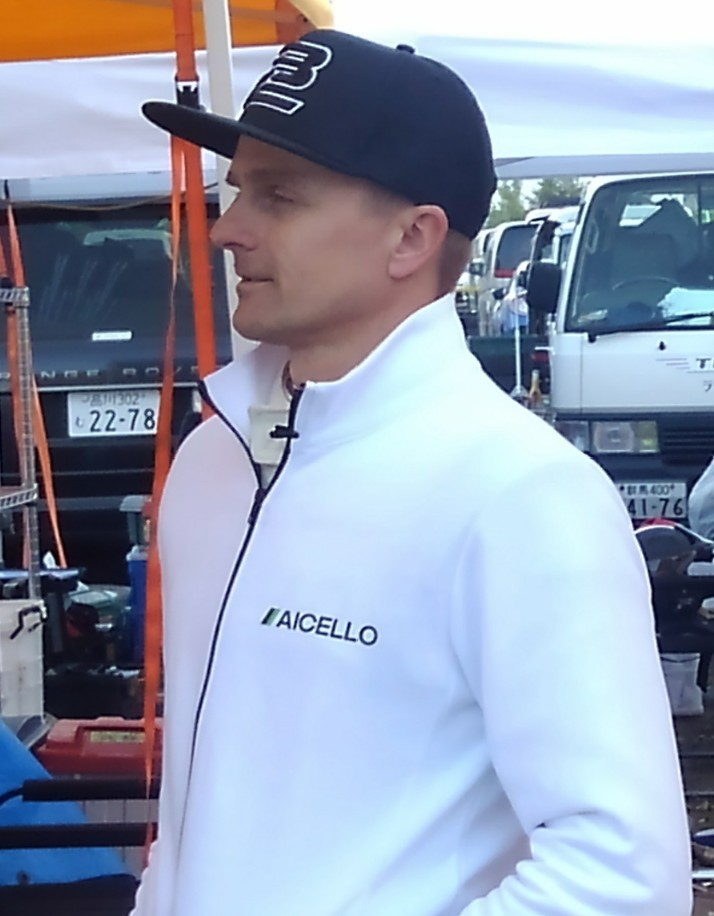 2019年ラリー・モントレーのサービス中のヘイキ・コバライネン